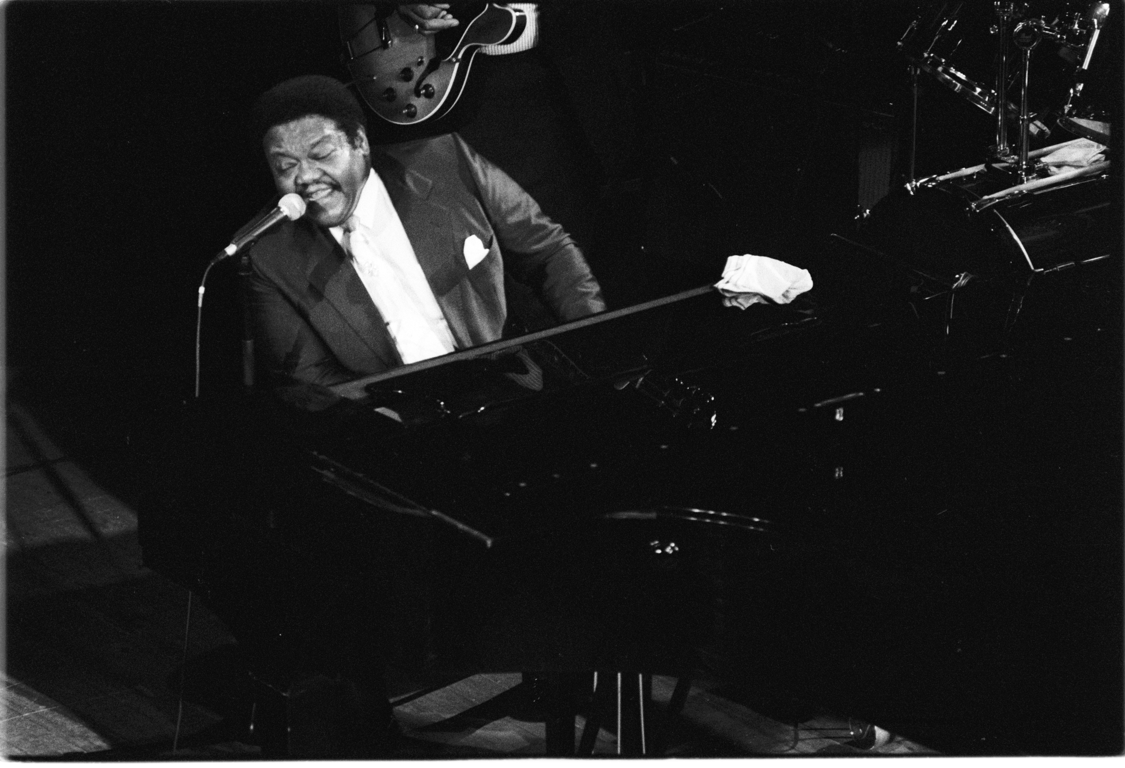 Le chanteur pianiste américain Fats Domino en concert à Deauville (Normandie, France) en 1992.